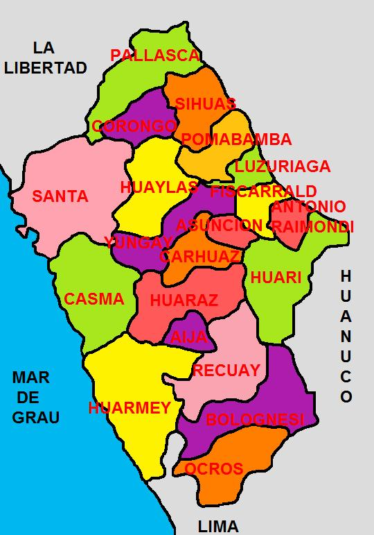 Imagen que muestra la División Politica del Departamento de Ancash, una de las 25 circunscripciones en que se divide el Perú